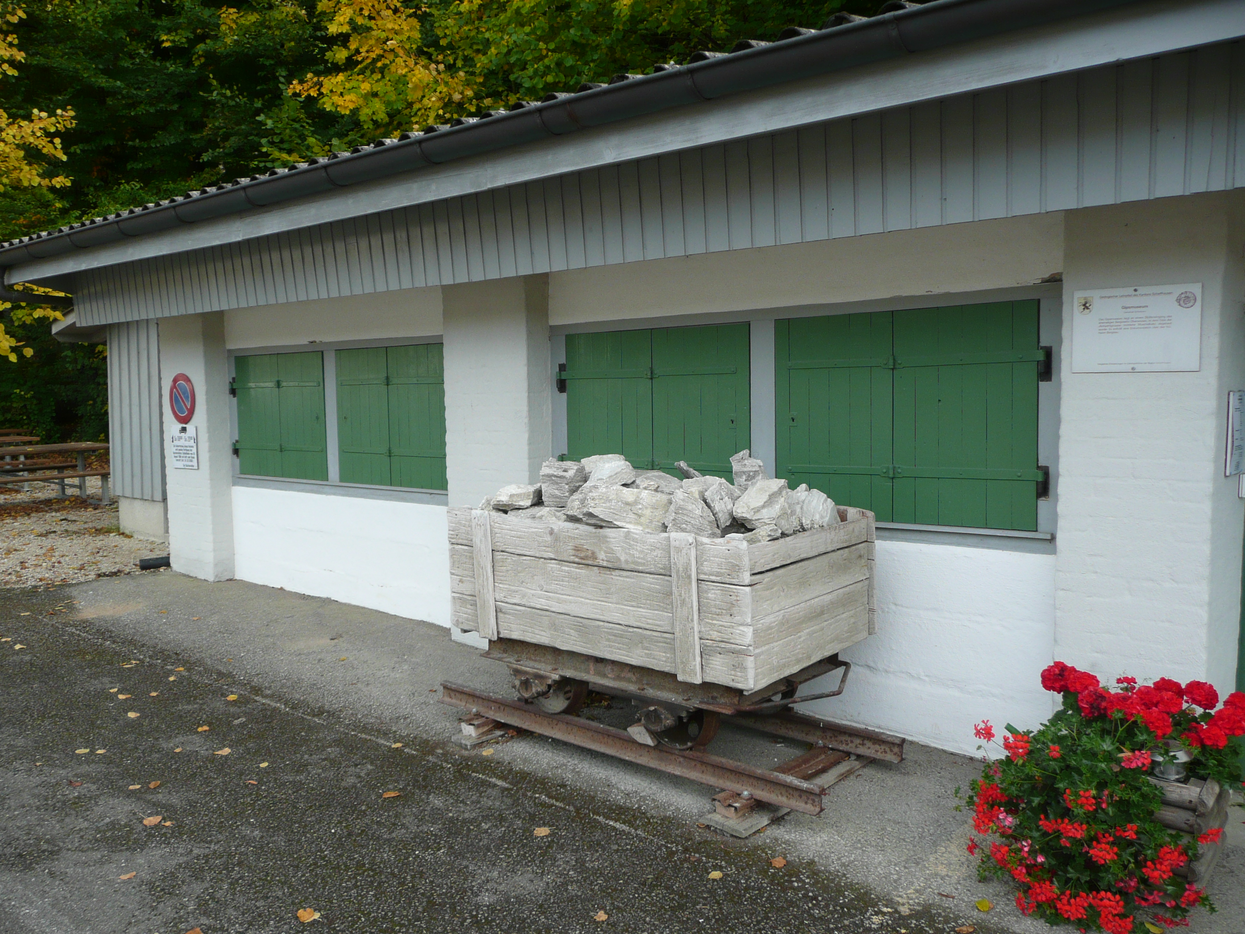 Gipsmuseum Schleitheim, Kanton Schaffhausen/Schweiz